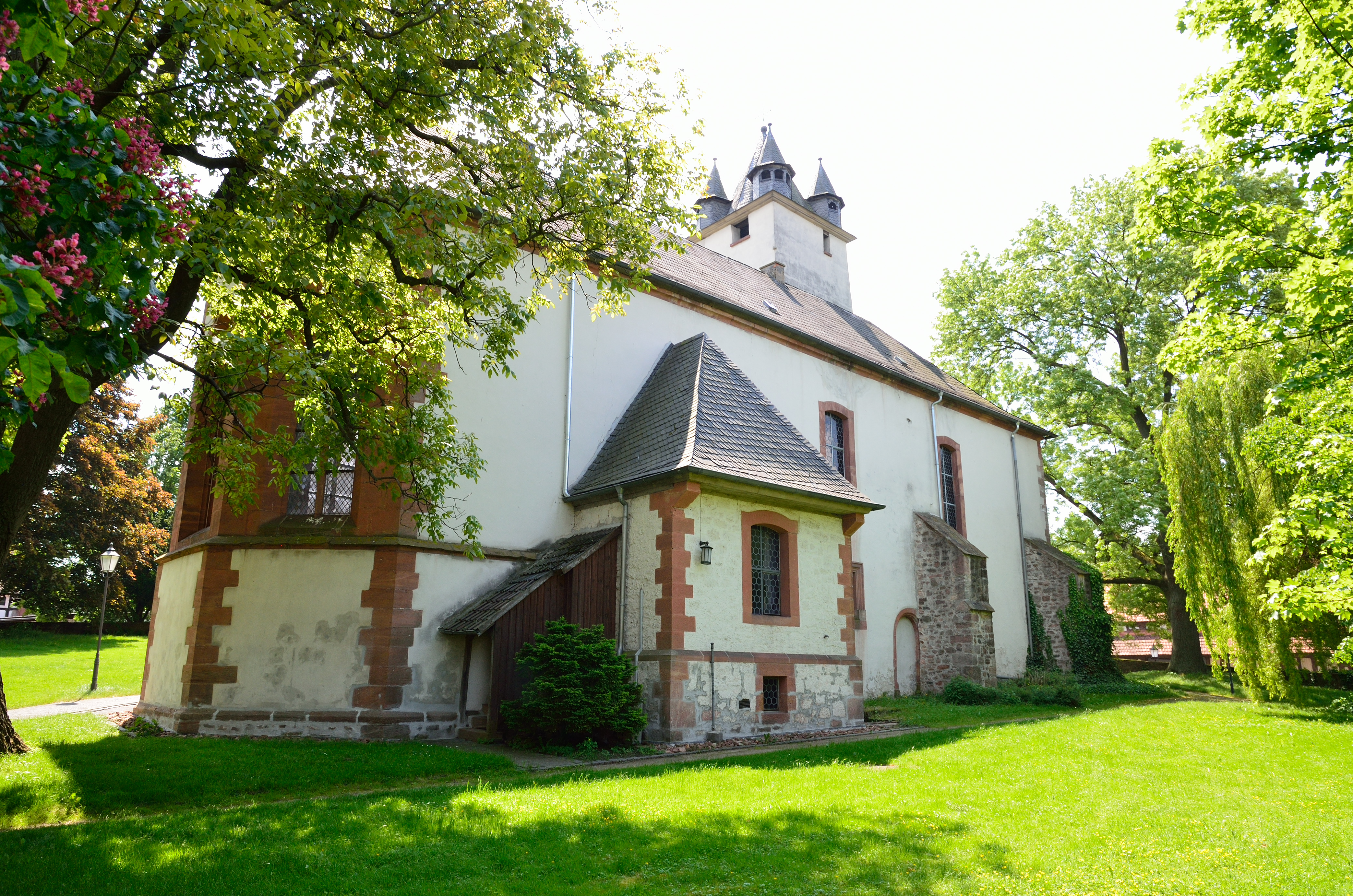 Nordostseite ev. Wehrkirche in Ebsdorf